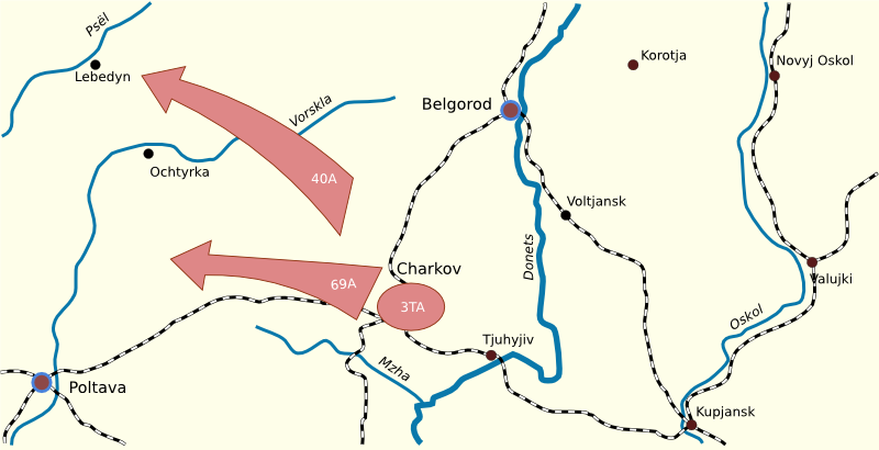 Operation Star, Soviet advance Feb 14-23 1943